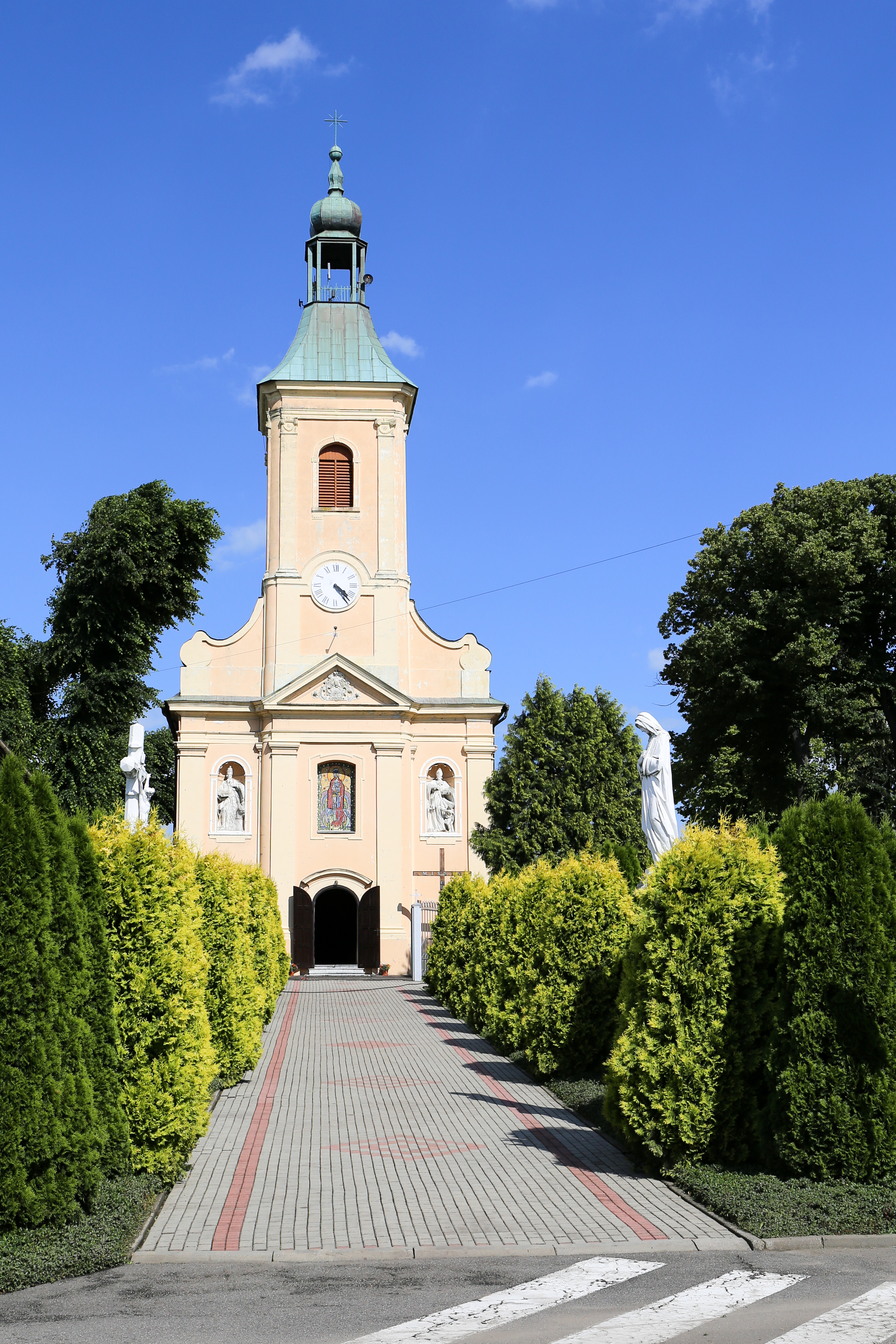 Maciowakrze, ul. Spółdzielcza 16 (Matzkirch) - rzymskokatolicki kościół parafialny pw. św. Floriana, 1772-1773